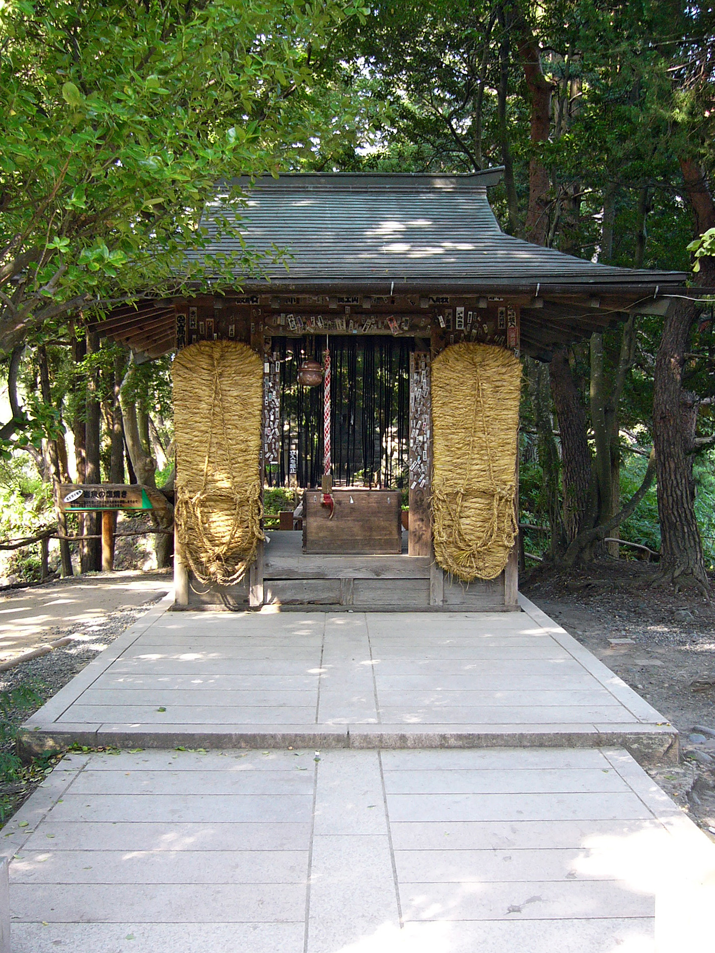 Daio Wasabi Farm in Azumino, Nagano, Japan